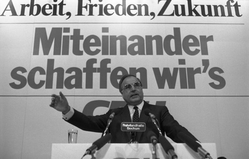 19.01.1983 CDU-Wahlkundgebung mit Bundeskanzler Dr. Helmut Kohl.